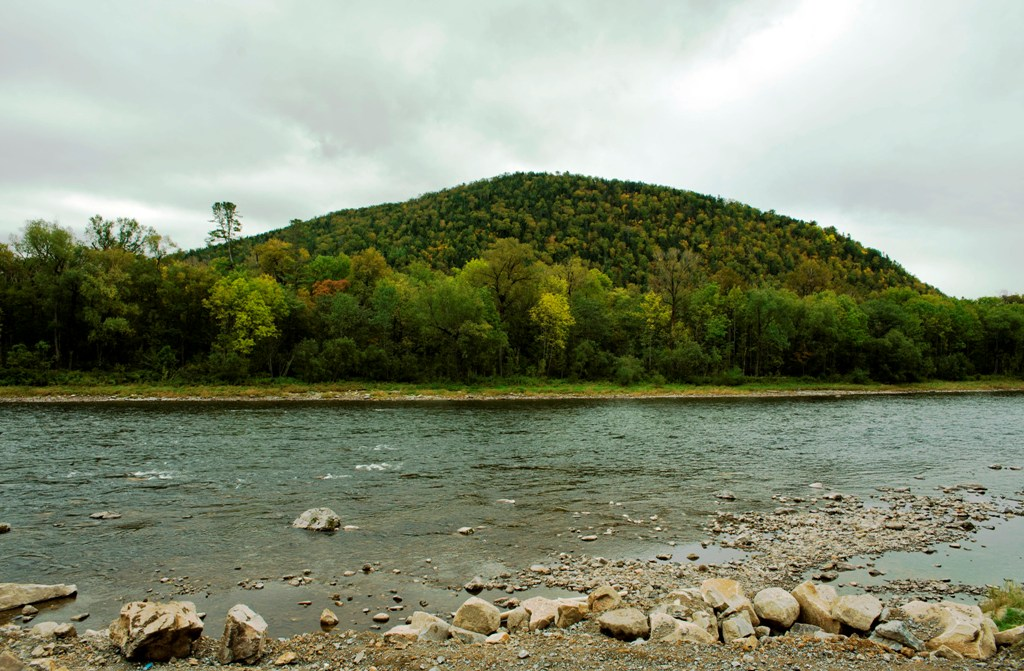 Река Анюй